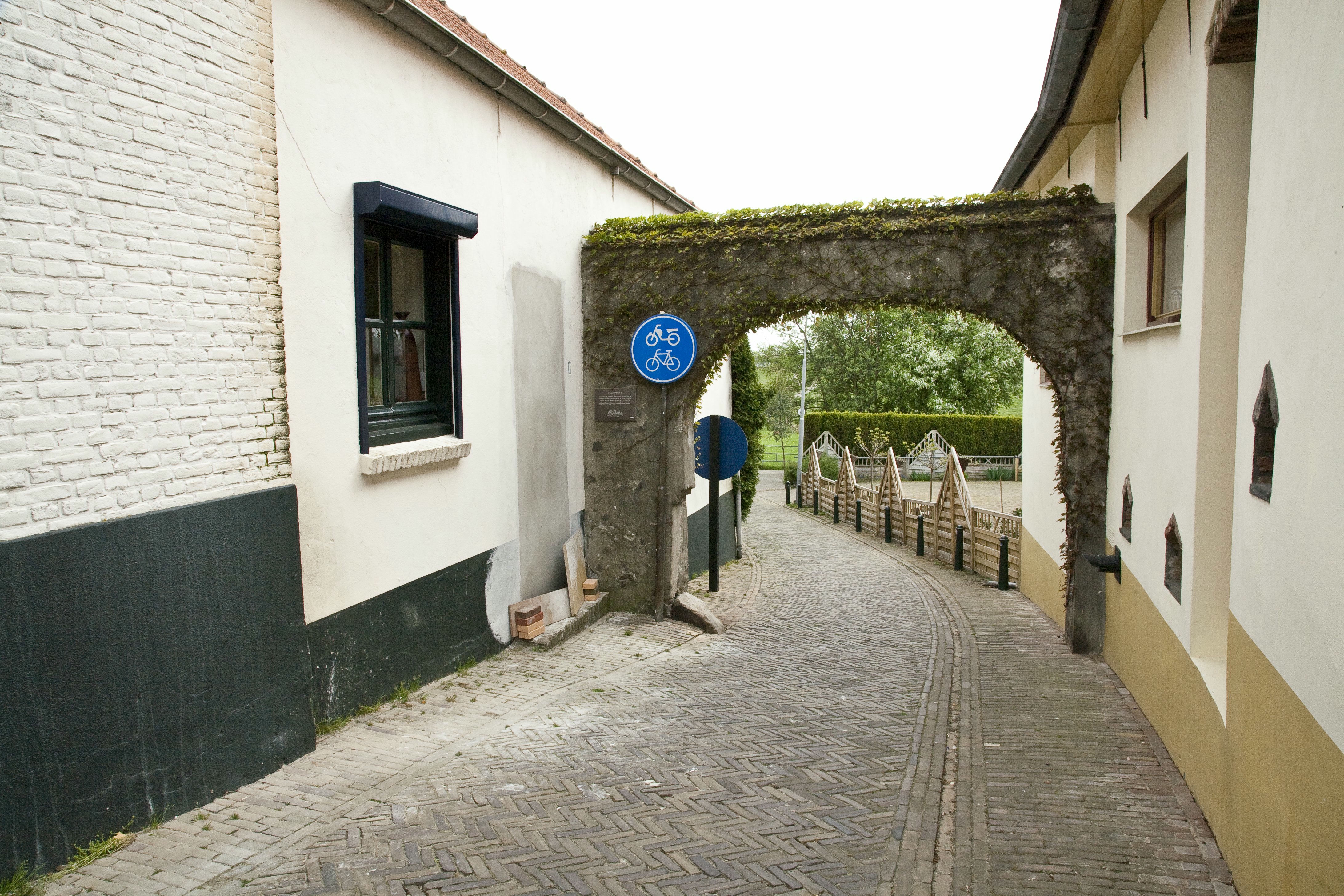 Schipperspoortje: Zicht op de voormalige toegang tot de aanlegsteiger van de rijnschepen (opmerking: Publicatie: TRAP Pannerdensch Kanaal (Cultuurhistorische Routes in Nederland - 58))